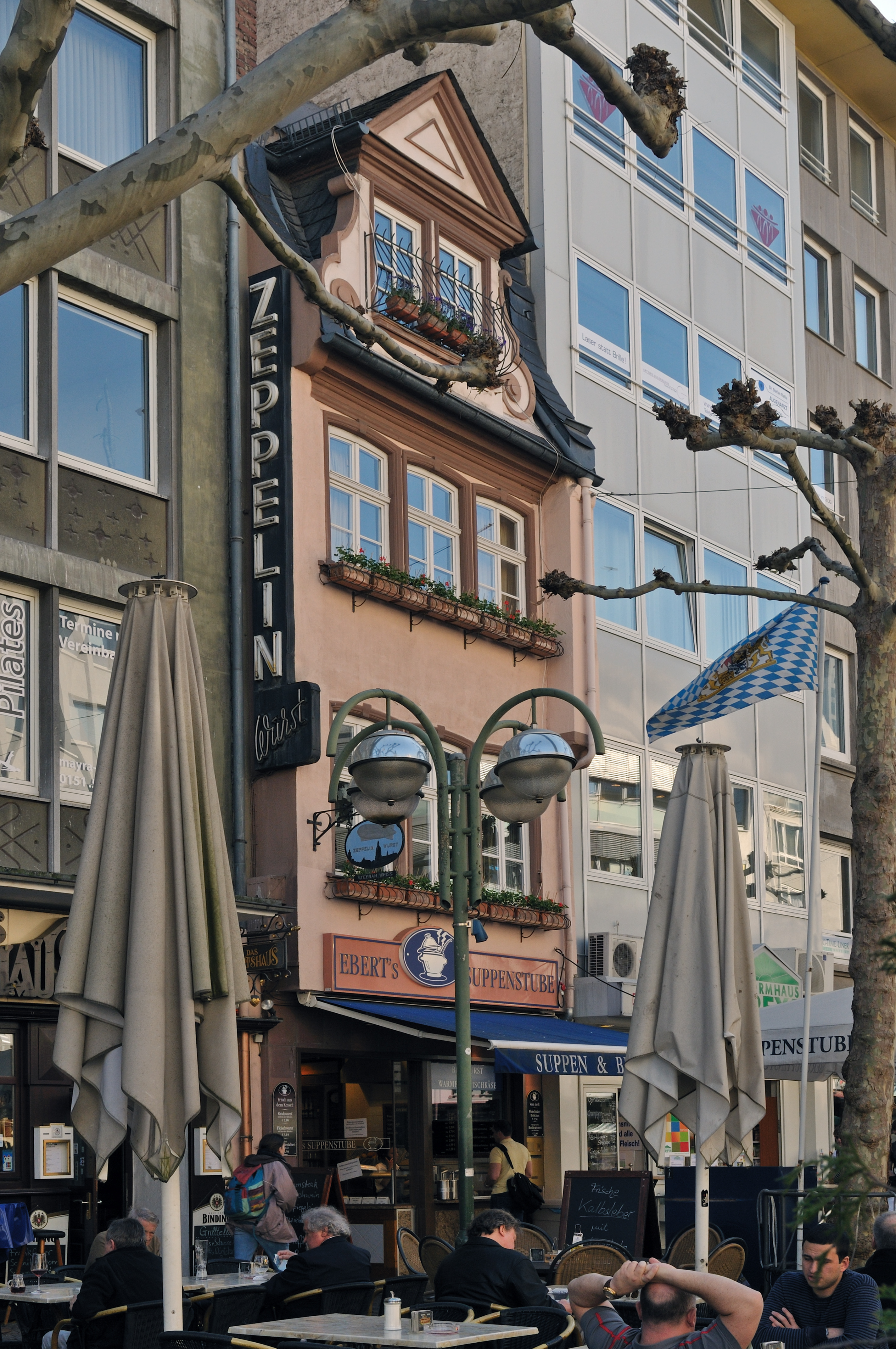 Leuchtreklame für Frankfurter Zeppelinwurst Ehemaliges Haus der Metzgerei Weiss, heute Eberts Suppenstube, in der Großen Bockenheimer Straße 31 in Frankfurt am Main